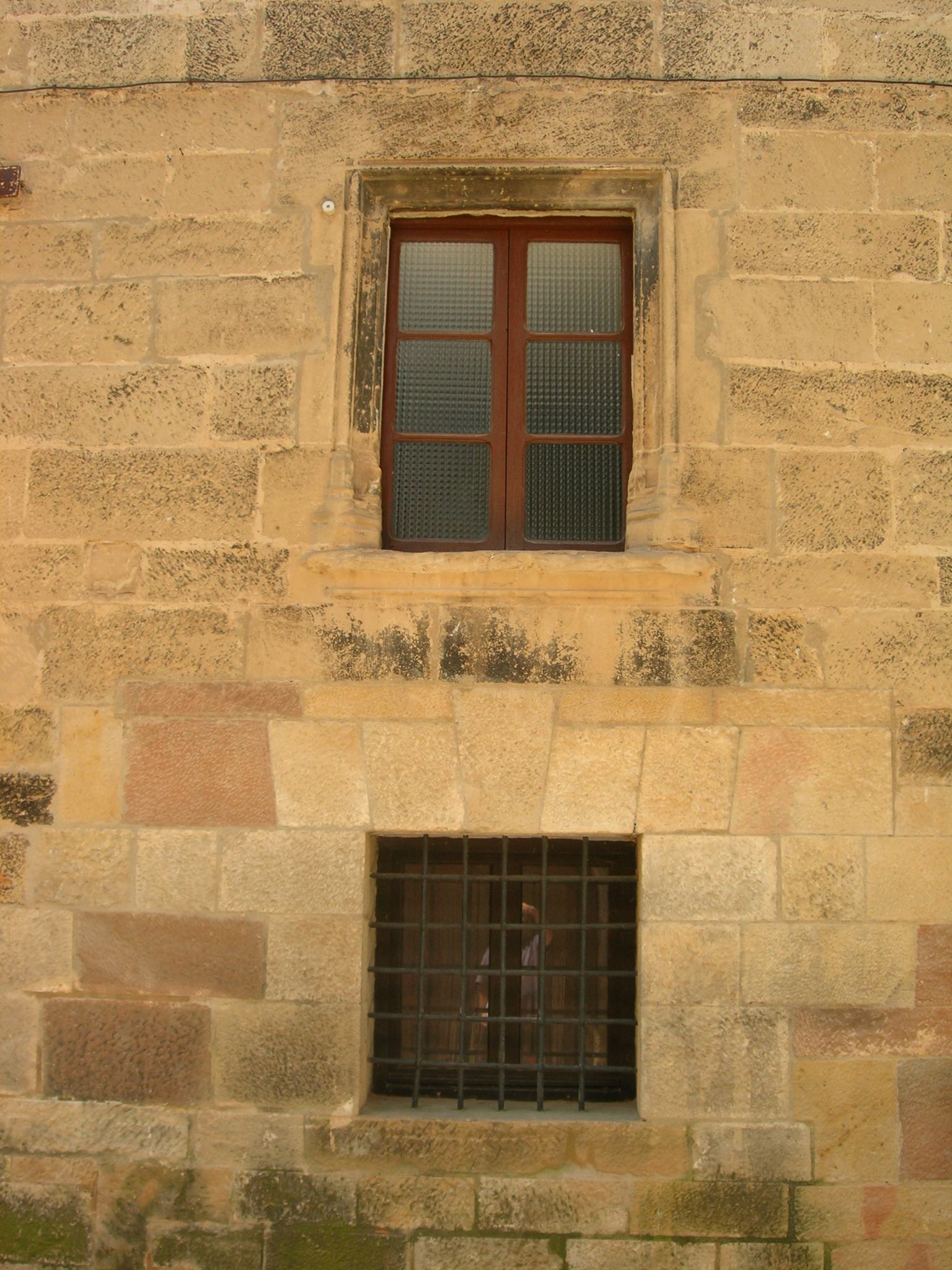 Casa consistorial (Fondespatla)